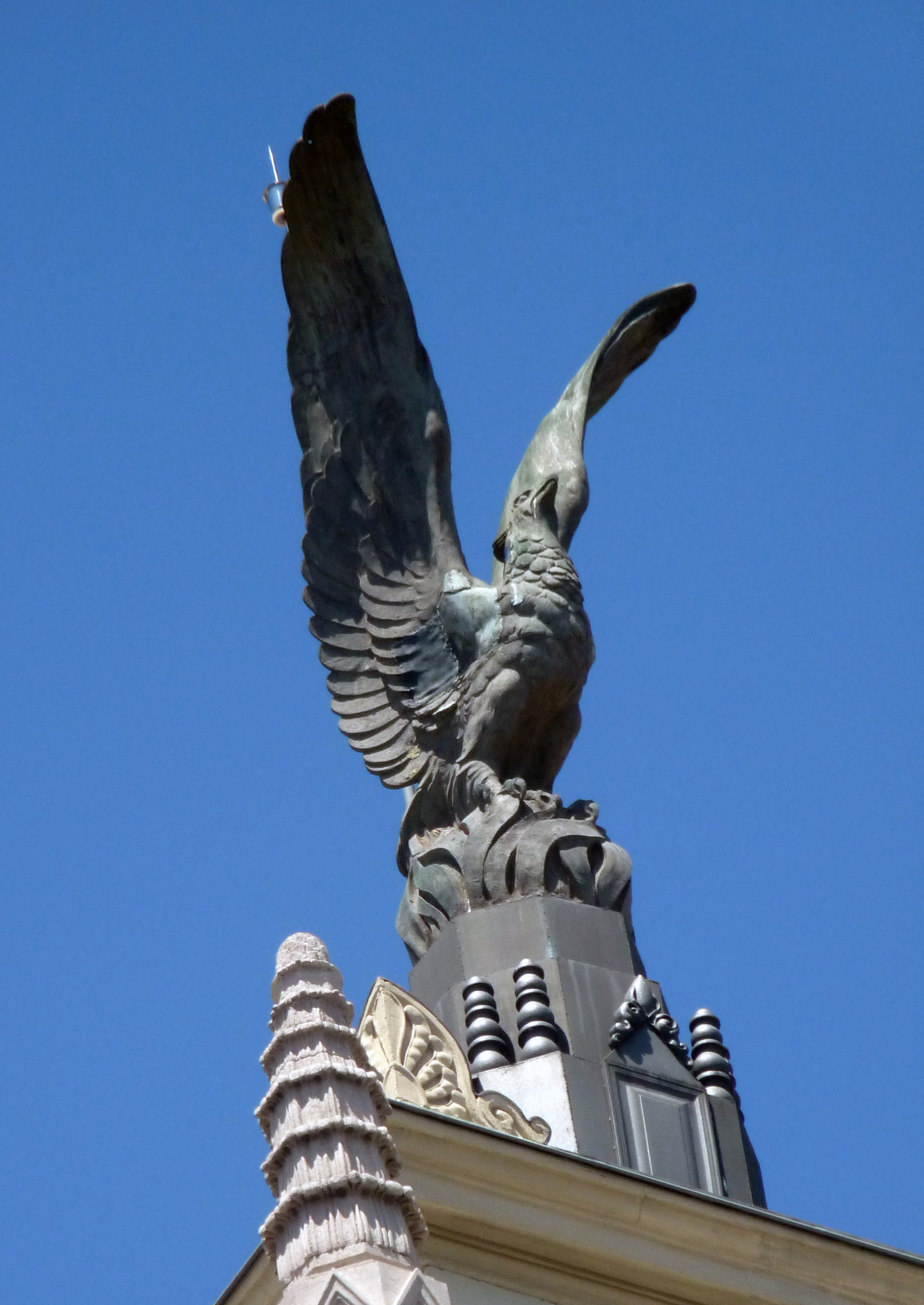 Ave Fénix en la cúspide del edificio La Unión y el Fénix Español, Madrid, España.